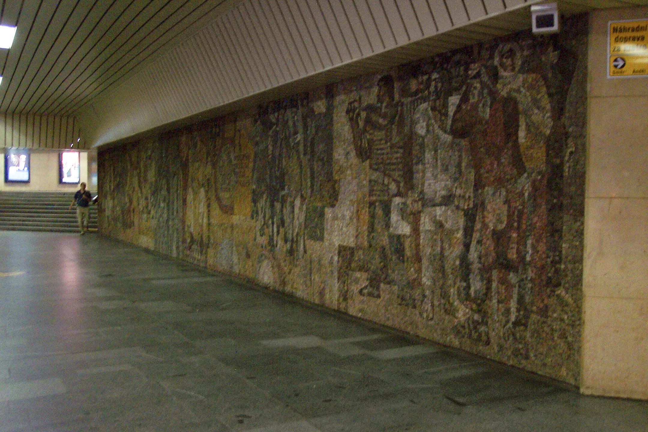 Stanice metra Karlovo náměstí - Metro station Karlovo náměstí